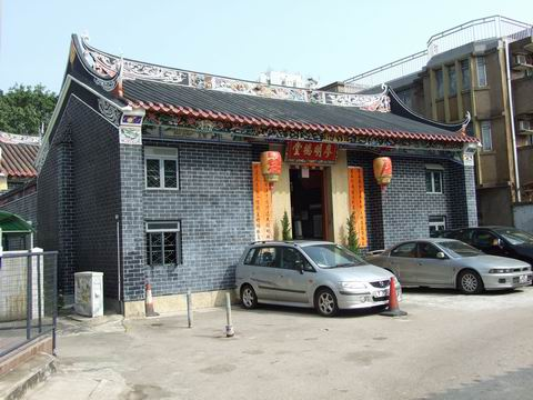 廖明德堂